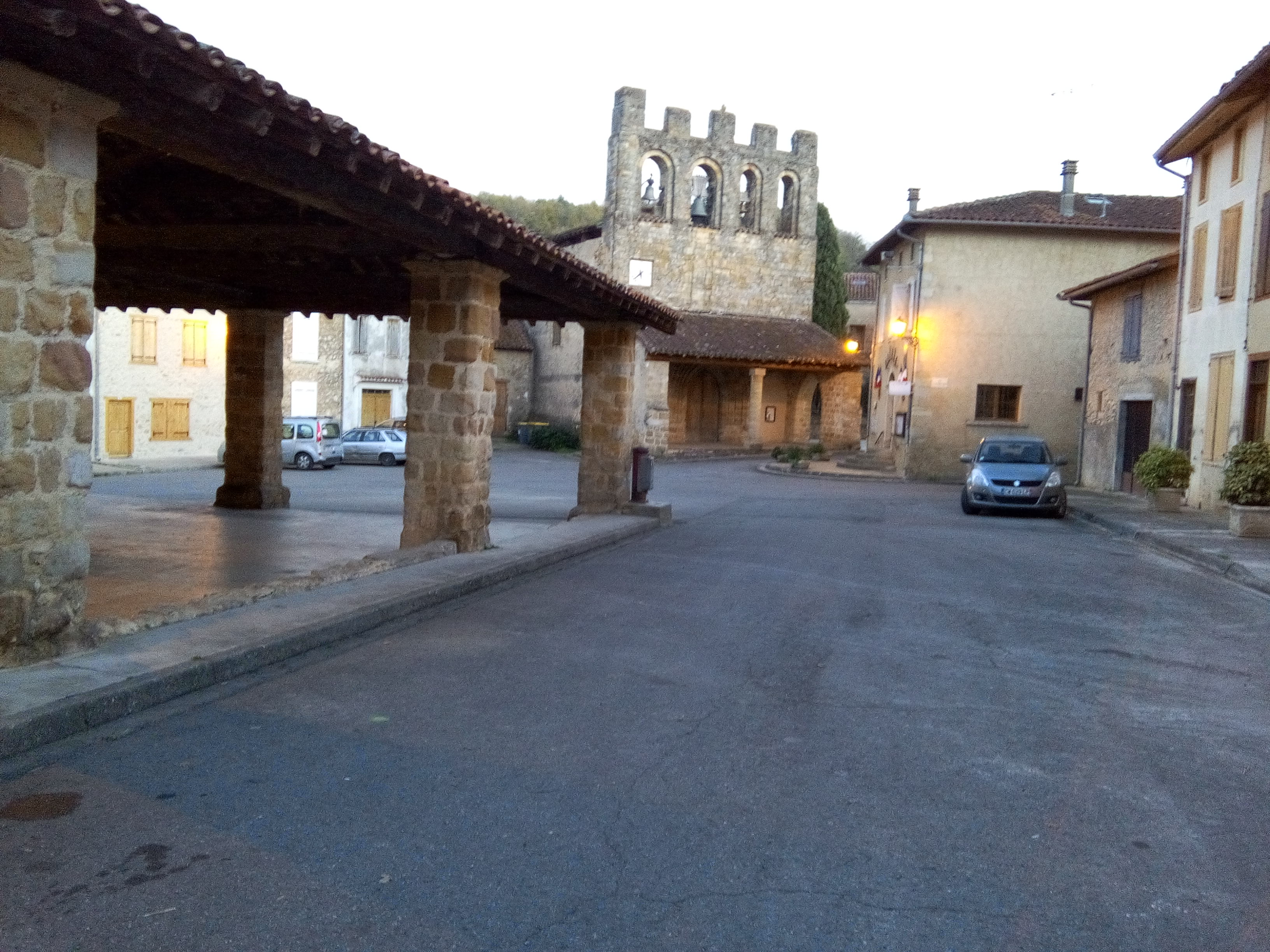 Église et mairie de Montbrun-Bocage